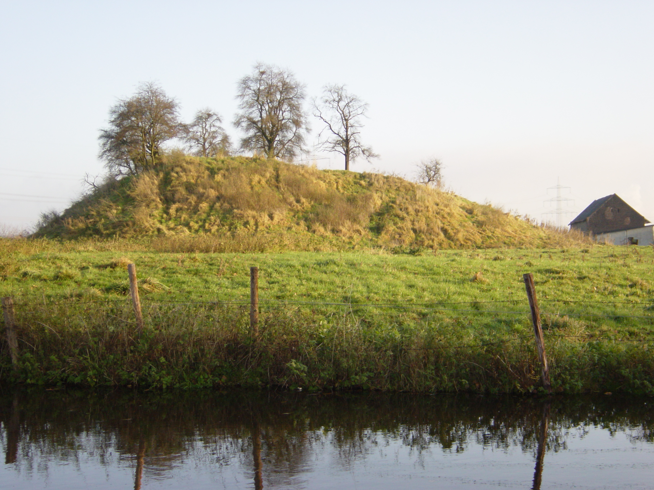 Motte bei Altenburg (Jülich), fotographiert von Südwesten